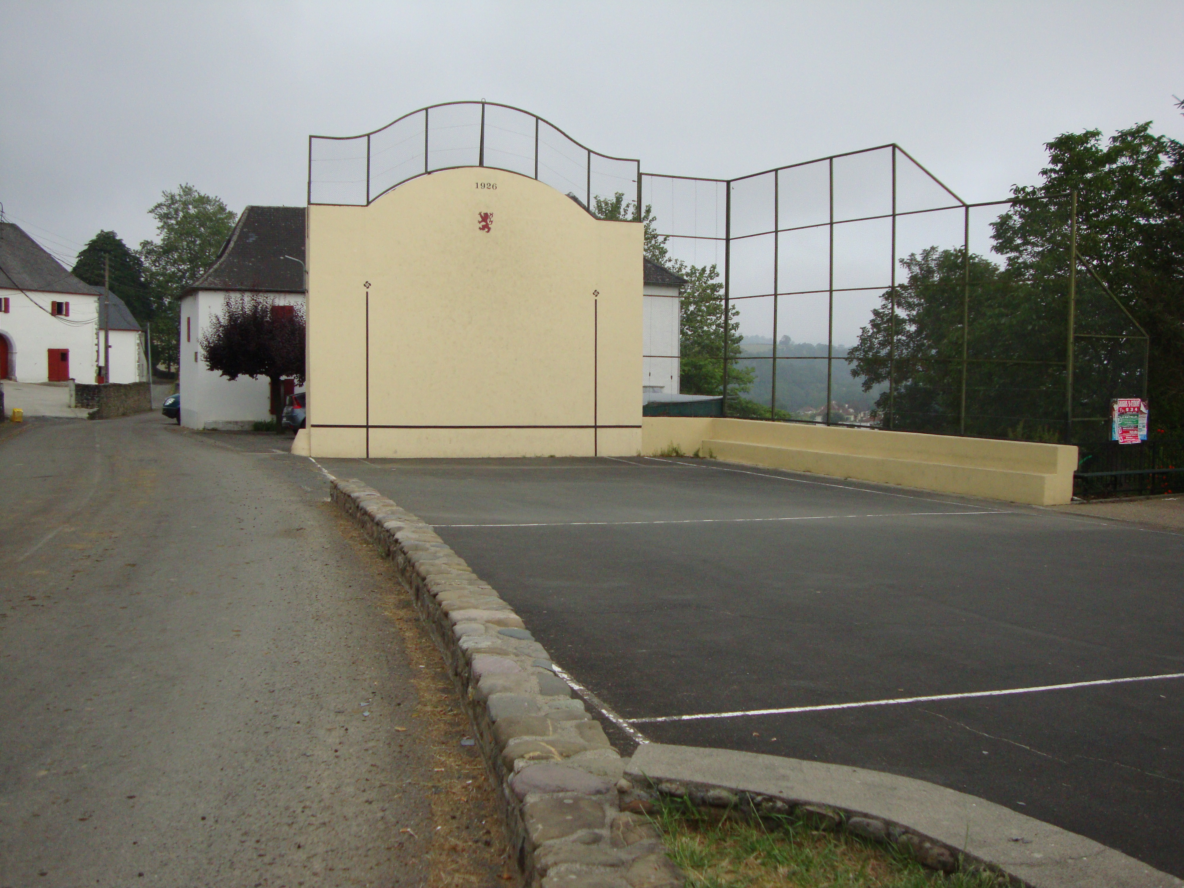 Mendy (Idaux-Mendy, Pyr-Atl, Fr) pelota court